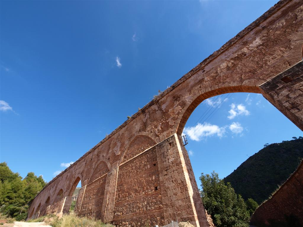 Acueducto de Portacoeli